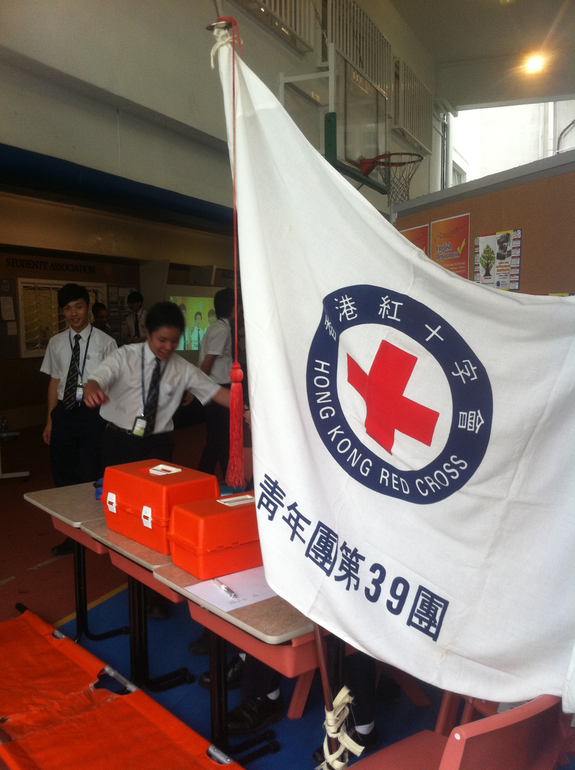 中文（香港）: 香港聖保羅書院 2011年11月 開放日